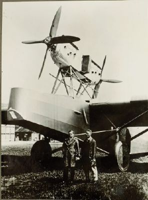 Comte AC-3.